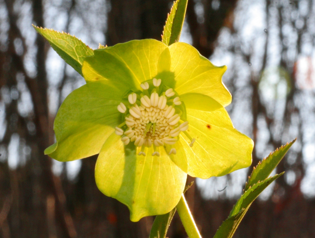 Helleborus_viridis (Elleboro verde) Località : Madonna del Parè, Limana (BL), 474 m s.l.m.